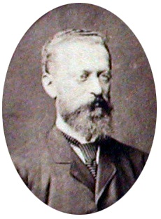 Horaz Krasnopolski (1842-1908), Univ.-Prof. für Zivilrecht in Prag